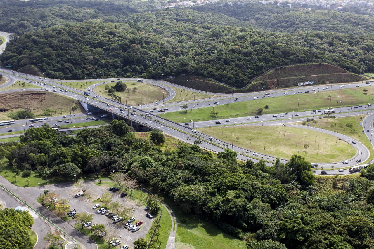 Viaduto Luis Eduardo Magalhães, da Avenida Luís Eduardo Magalhães para a Avenida Paralela, em Salvador.